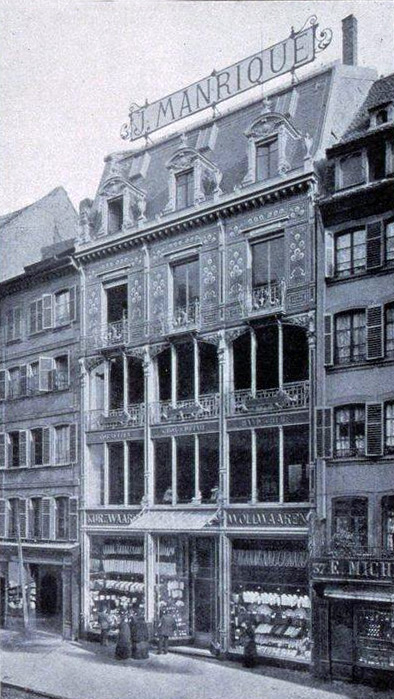 Strasbourg : J. Manricke. 33 und 35 Gewerbslauben, nahe dem Kleberplatz. 1898. Bibliothèque nationale et universitaire de Strasbourg